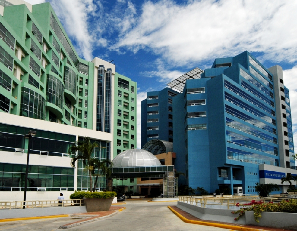 Infraestructura de HOMS